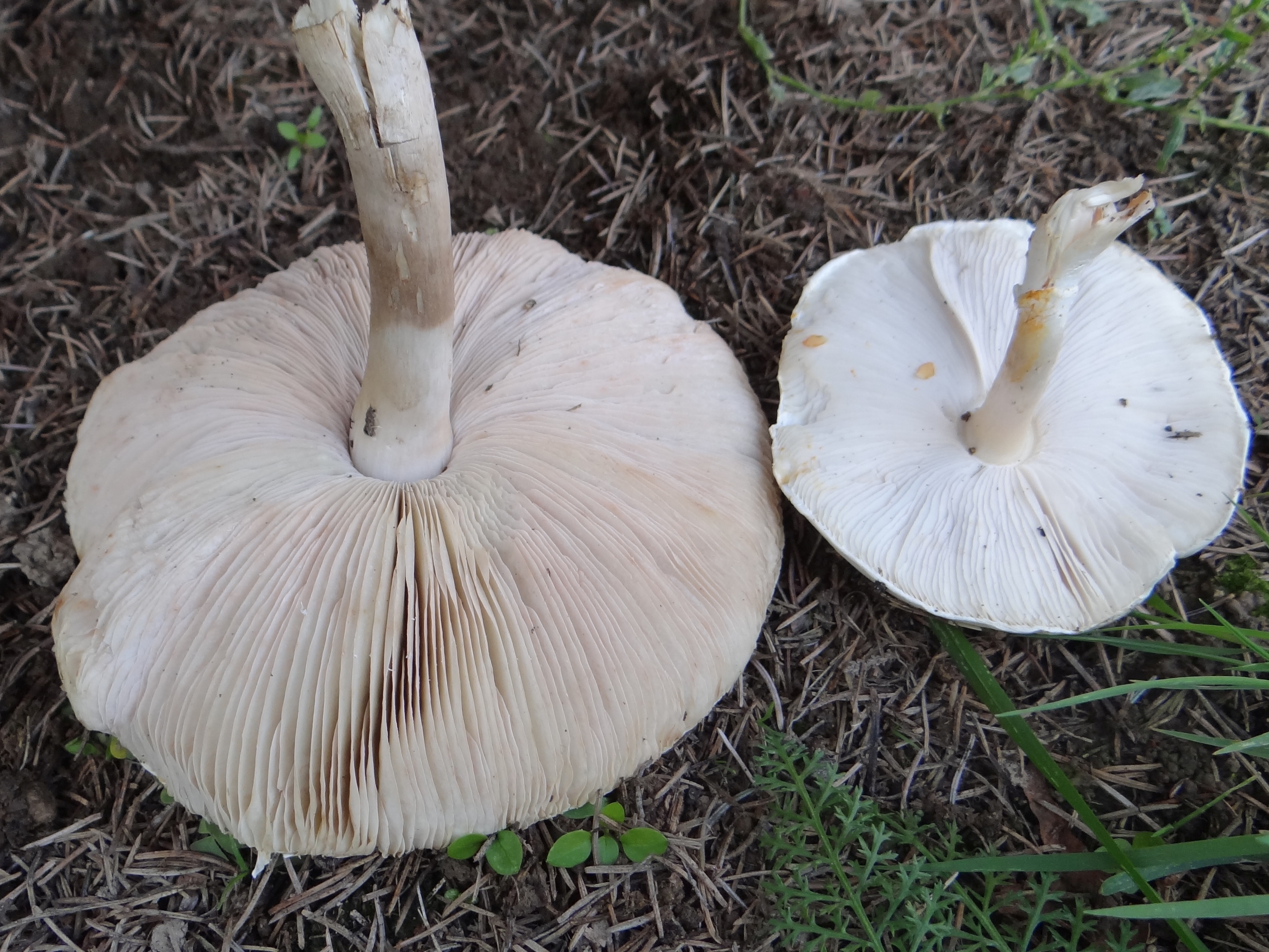 Leucoagaricus leucothites (location: Poland, Trzciana (wojeóodztwo małopolskie)